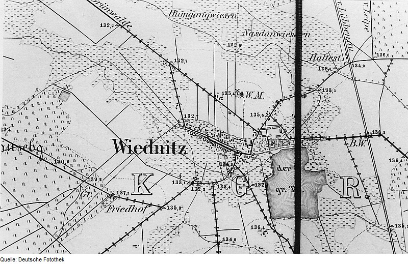 Original image description from the Deutsche Fotothek Wiednitz. Meßtischblatt, 1:25.000, Sekt. Straßgräbchen, 1883